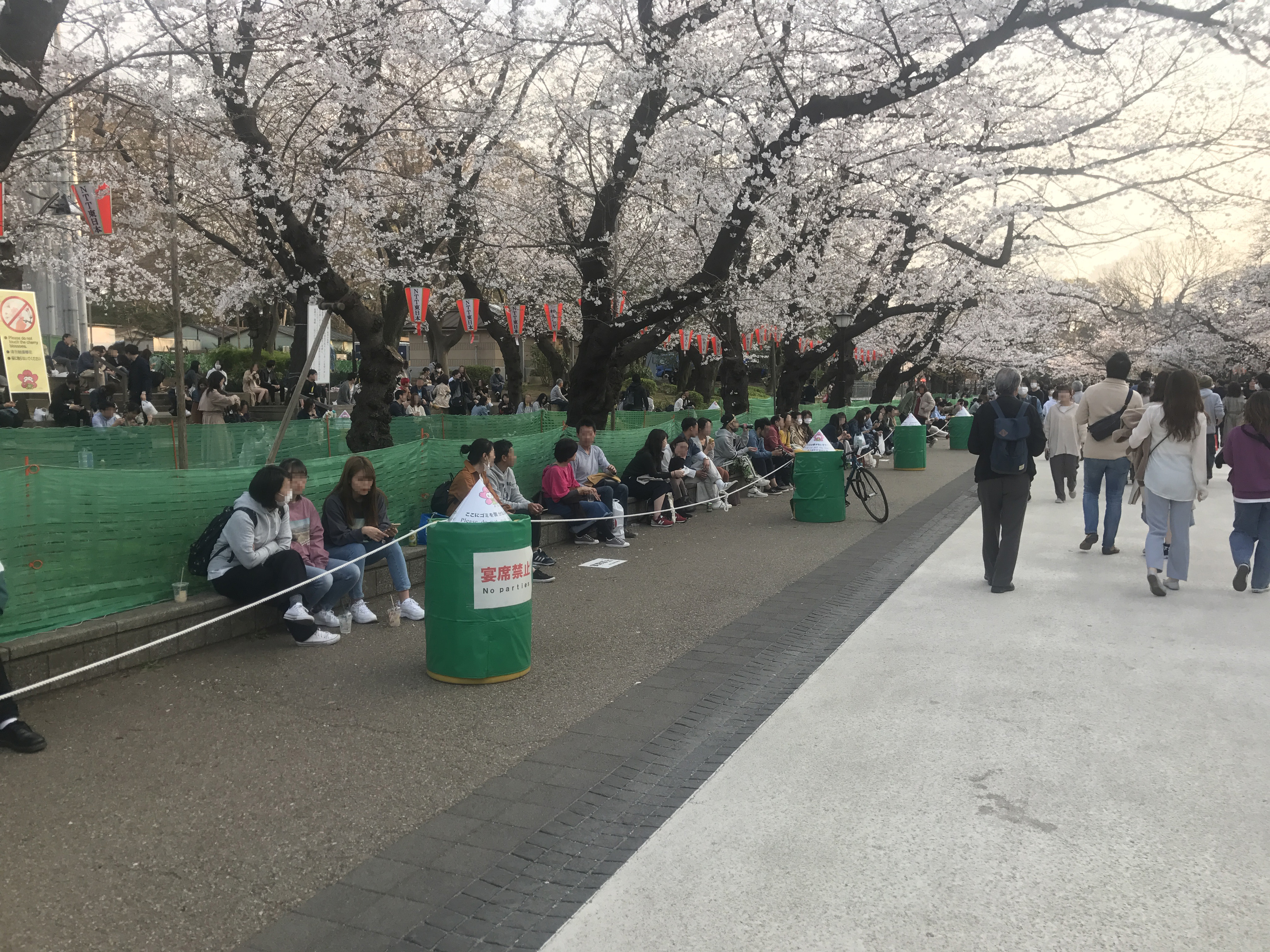 2020年の上野公園での花見の様子。新型コロナウイルス感染症の流行防止の観点から、さくら通りでの宴会の開催は禁止された。